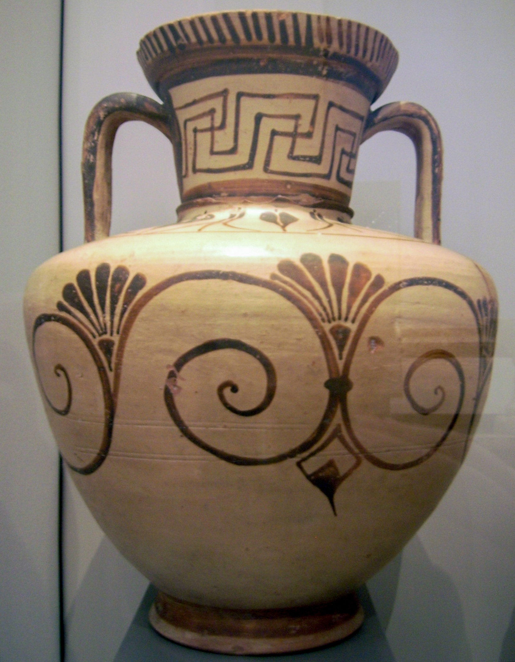 Antikensammlung Berlin/Altes Museum